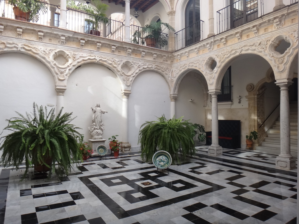 Patio principal del Palacio de Bertemati, Jerez de la Frontera (Andalucía, España)